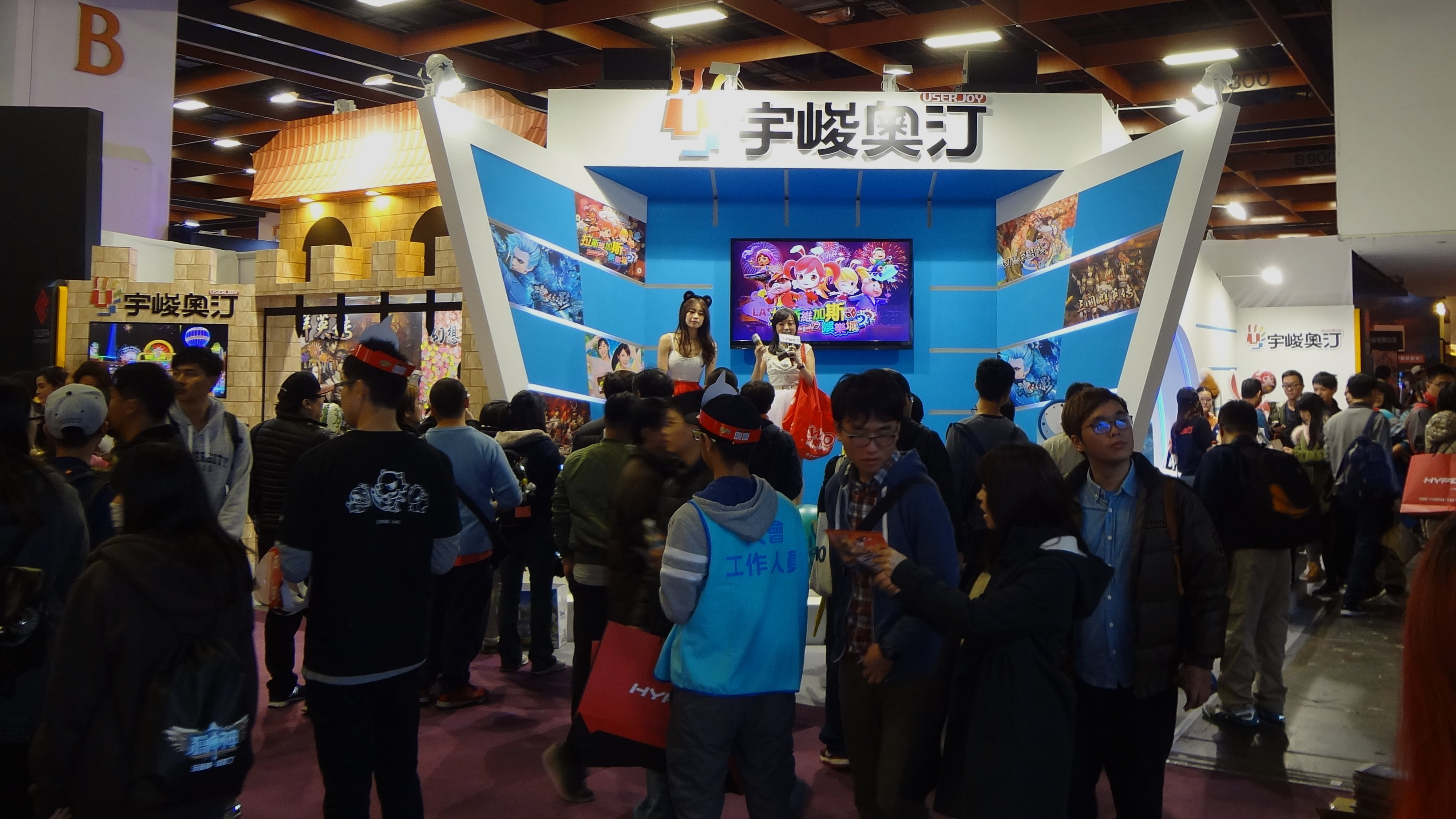 2017臺北國際電玩展，宇峻奧汀科技攤位。